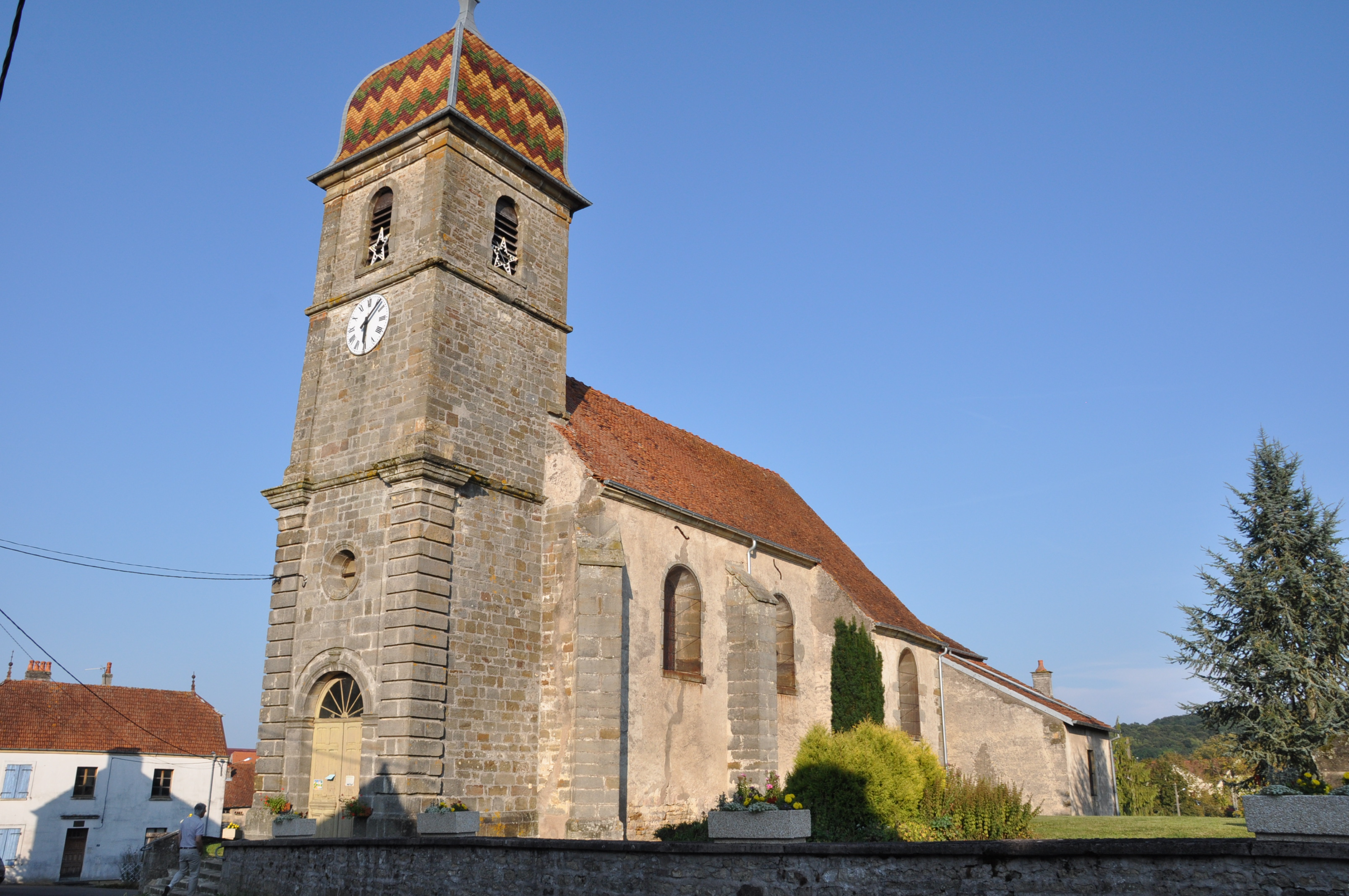 Église de Senoncourt, (Inscrit, 1934) .